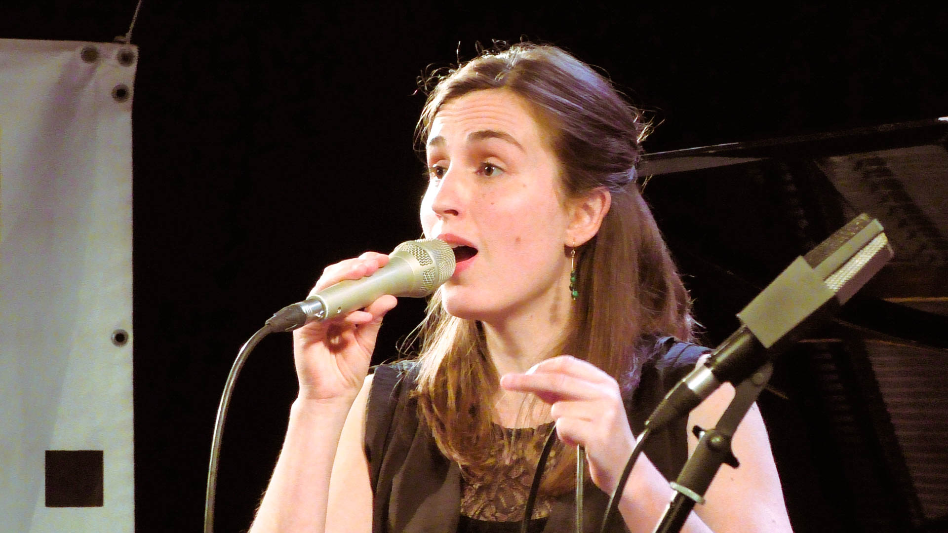 13.10.2017. КЦ ДОМ, Концерт в рамках совместного проекта фестиваля Гёте-Института "Джаз осенью" и фестиваля Leo Records.